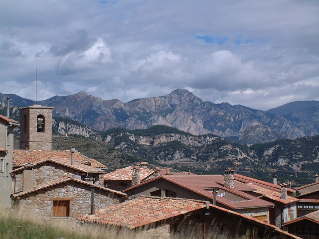 Maçaners at Google maps